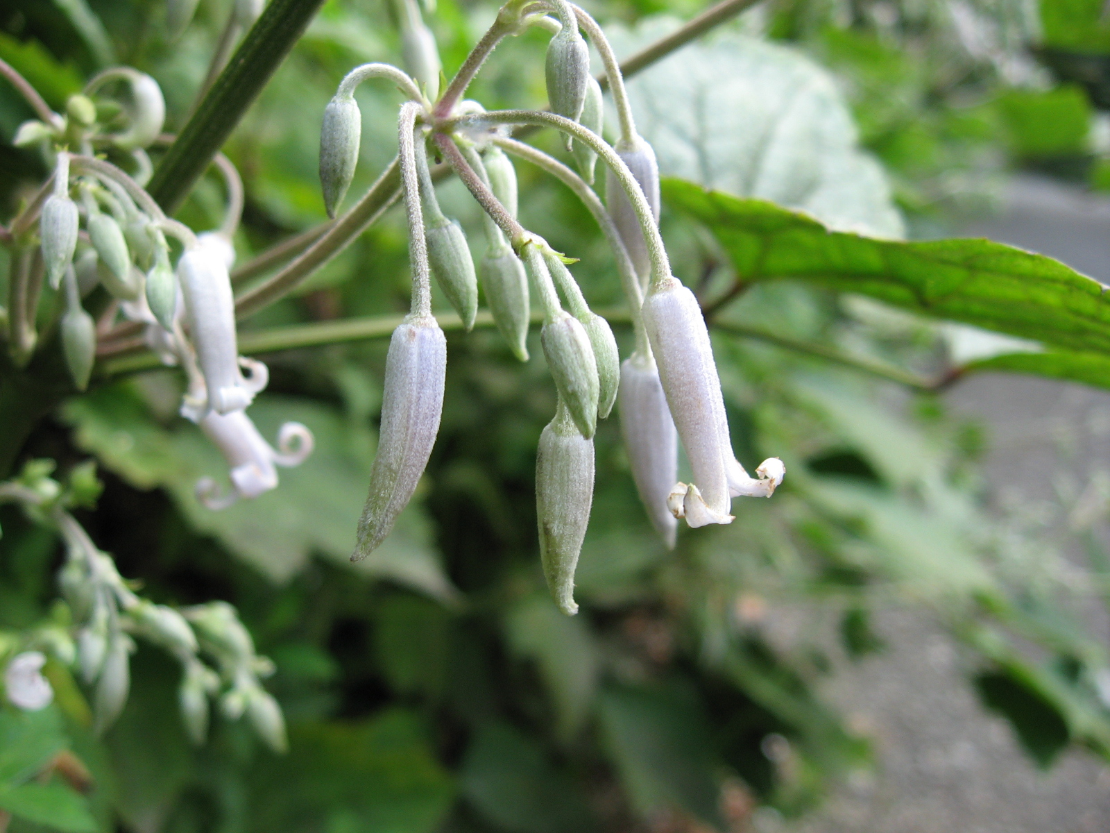 クサボタン